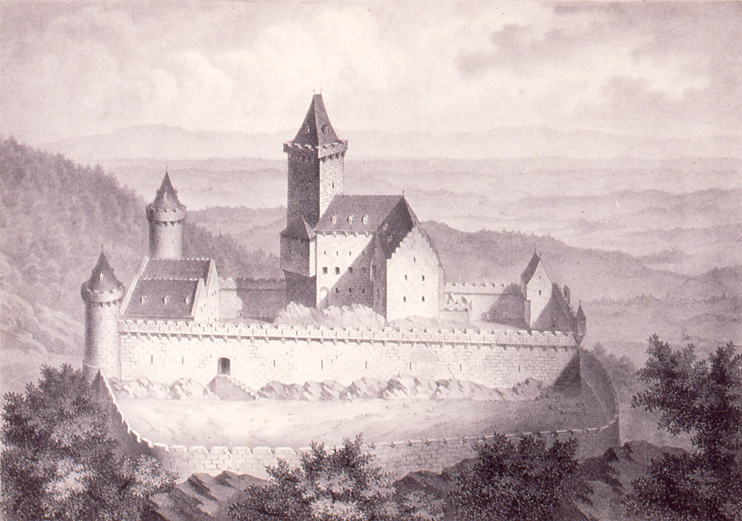 Lithographie der Burg Landsberg im 16. und 17. Jahrhundert, Ansicht von Südwesten